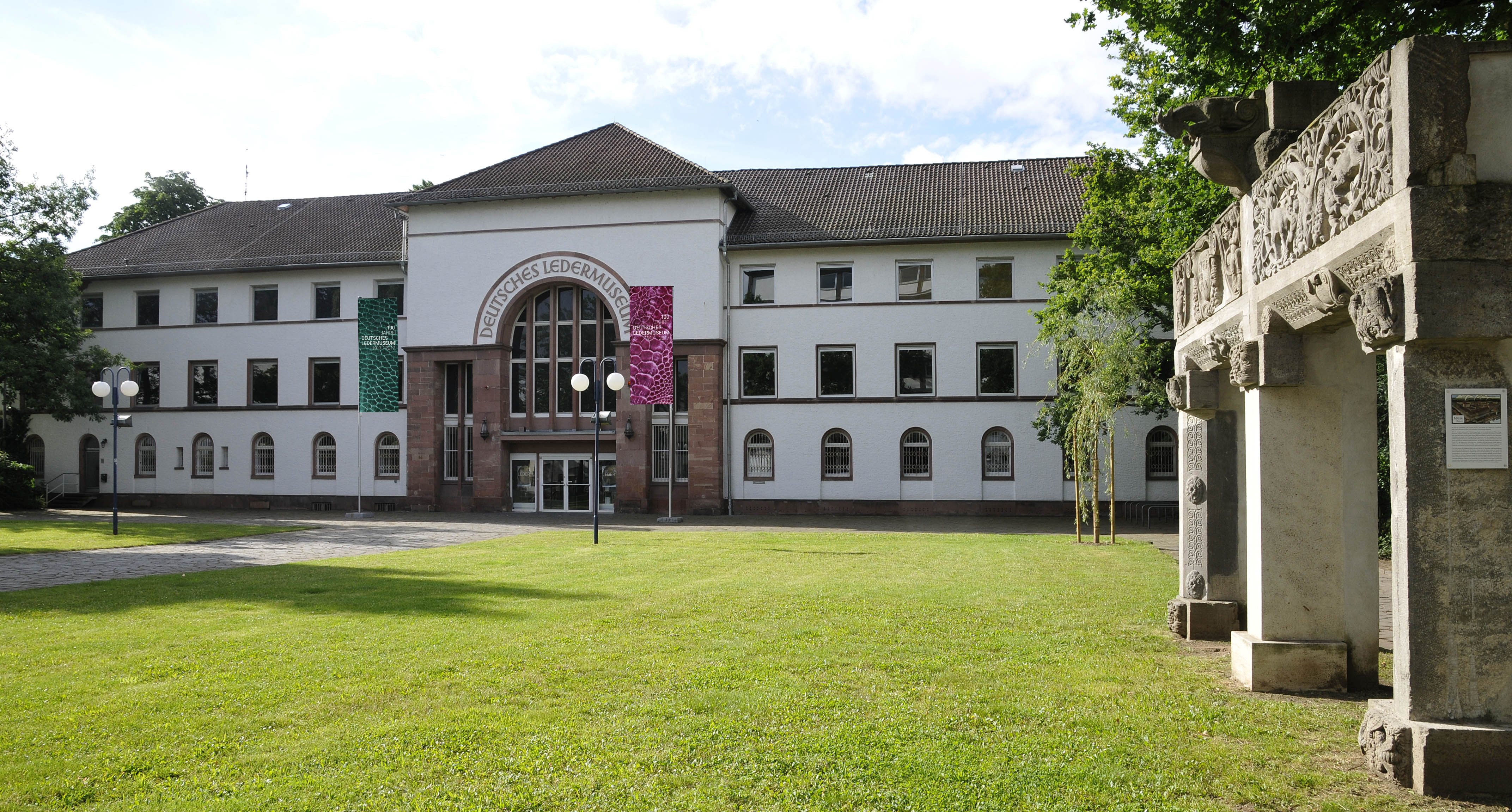 Außenansicht des Deutschen Ledermuseums, April 2017, Copyright DLM/C. Perl-Appl